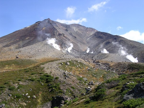 大雪山旭岳 / Asahidake, Daisetsu-zan, Hokkaido, Japan